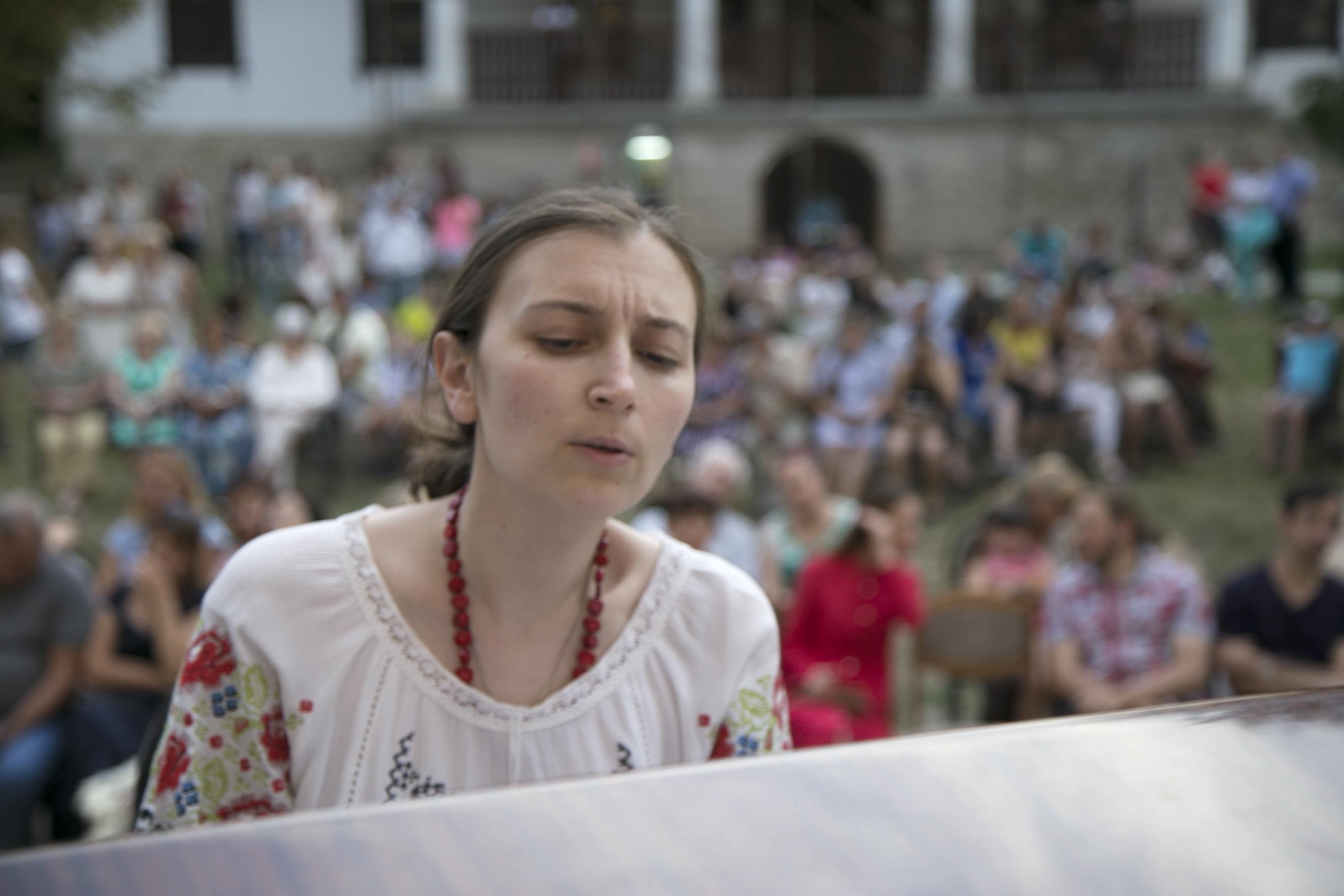 Les premiers concerts de musique classique vivante (moldave) dans un nombre de villages de la République de Moldavie, offerts par des musiciens du monde entier.